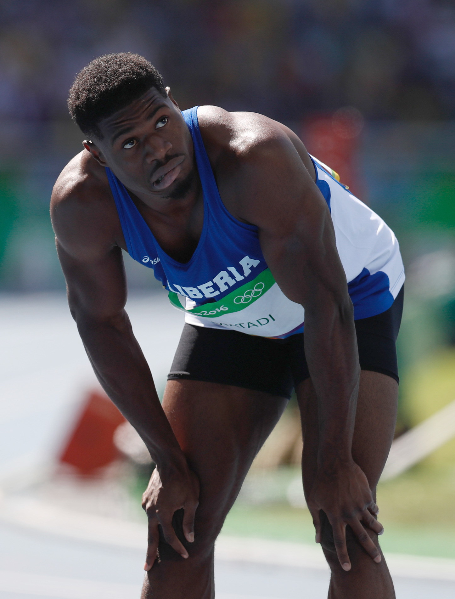 Men's 100 m sprint heats